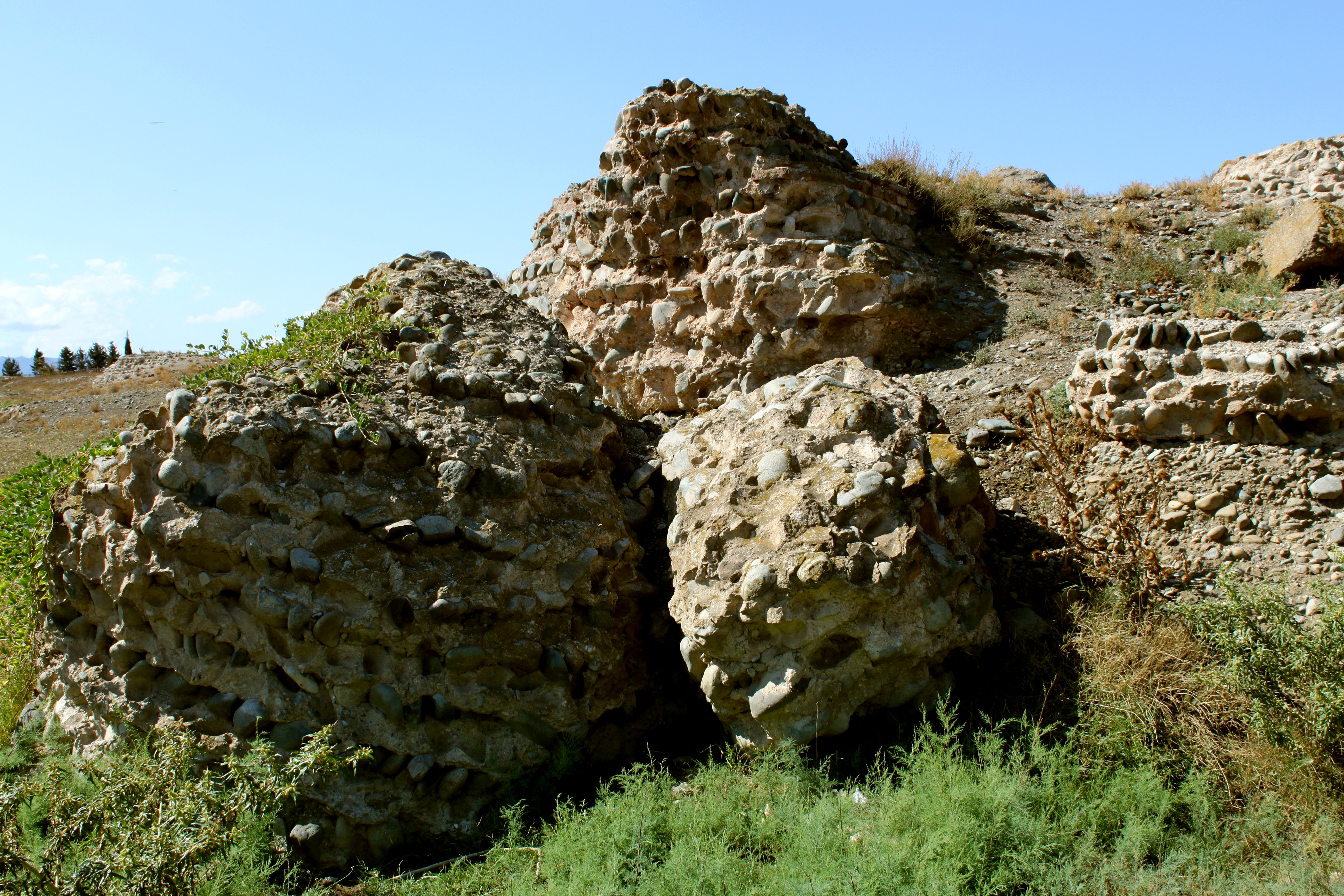 Xan sarayı qalıqları